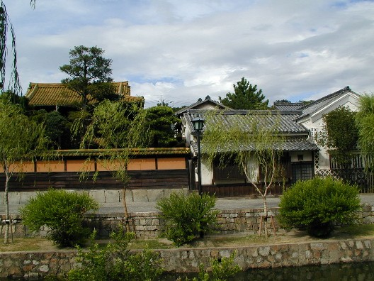 Kurashiki1